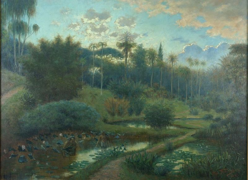 Olieverfschilderij. Een tafereel uit de plantentuin te Buitenzorg